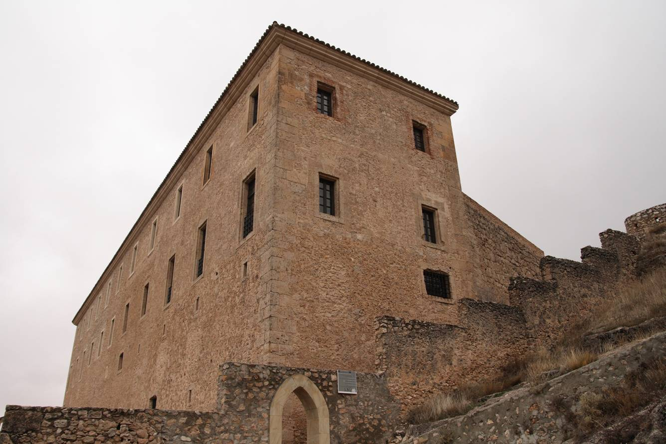 Vista oriental del Archivo Histórico Provincial de Cuenca y parte de la muralla del Castillo.